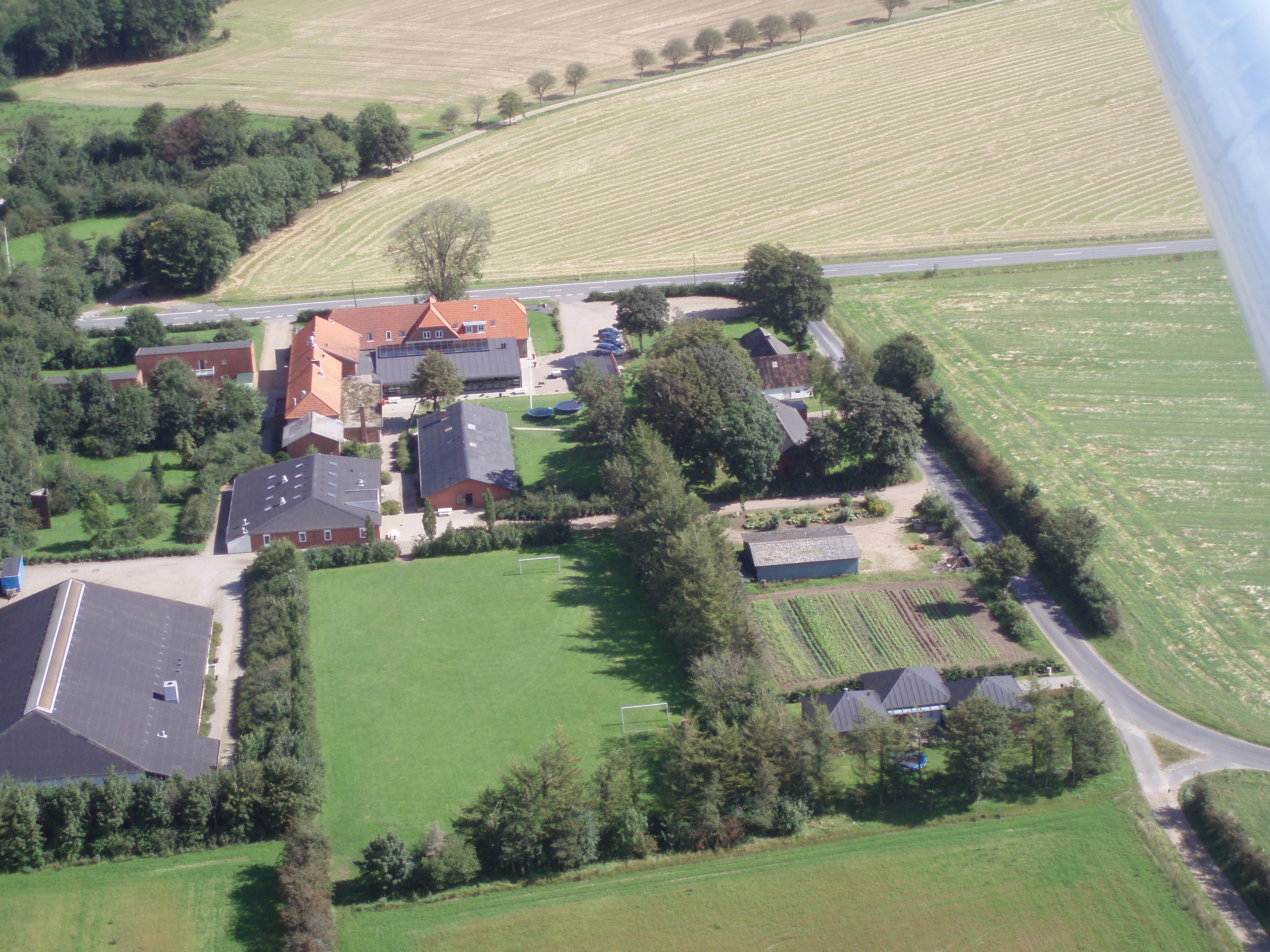 KE oppefra